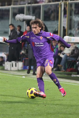 Adem Ljajić è un calciatore serbo, trequartista della Fiorentina e della Nazionale serba.